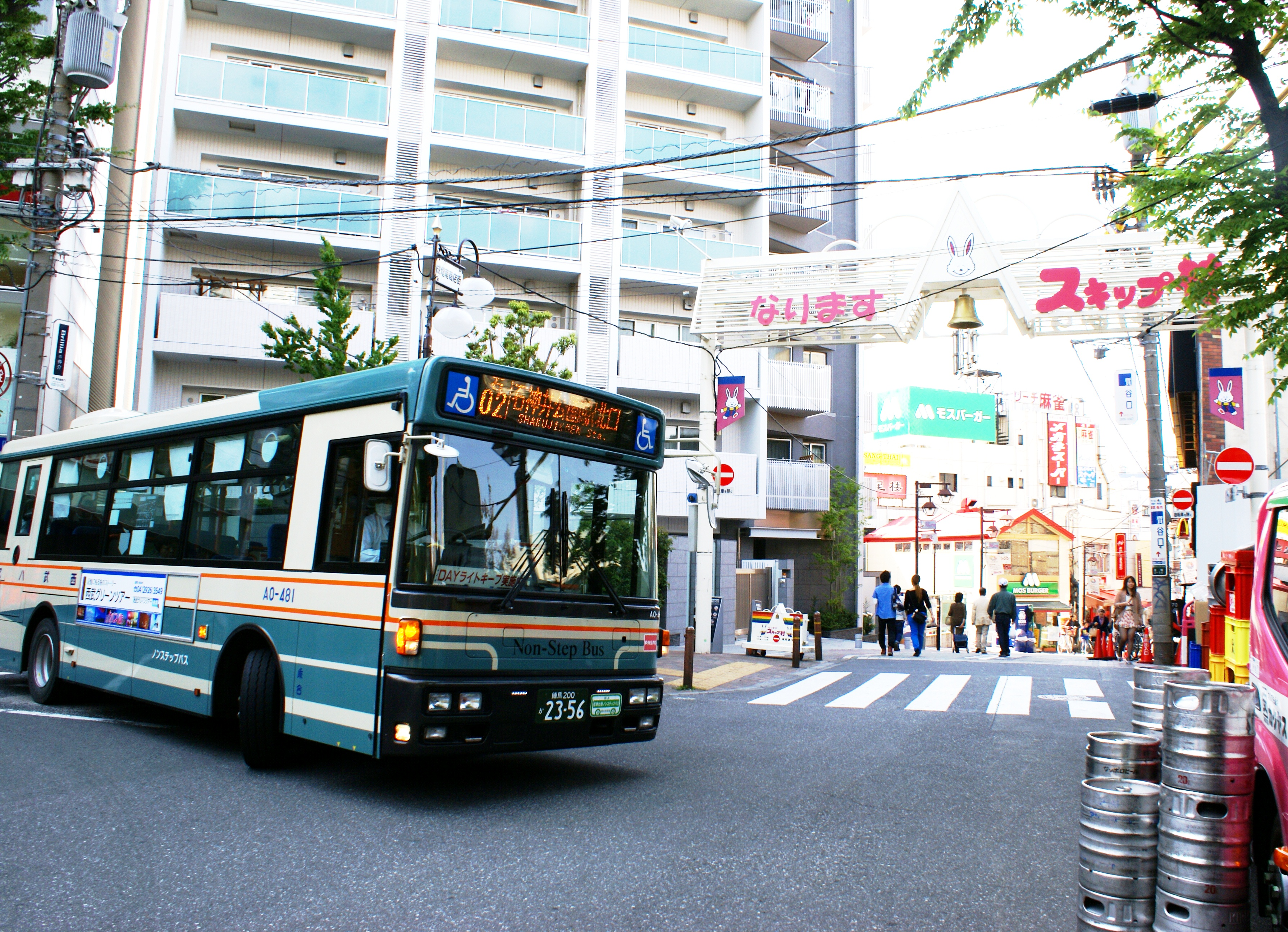 成増スキップ村商店街